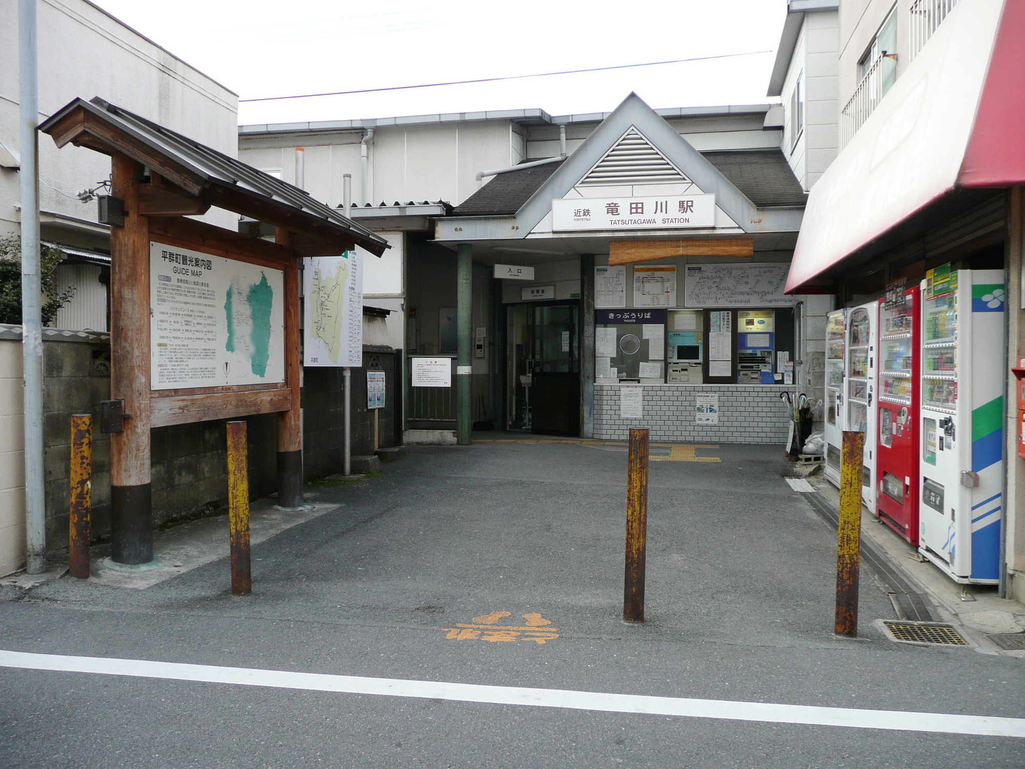 Kinki Nippon Railway,Ikoma Line,Tatsutagawa Station. /近鉄生駒線駅竜田川駅